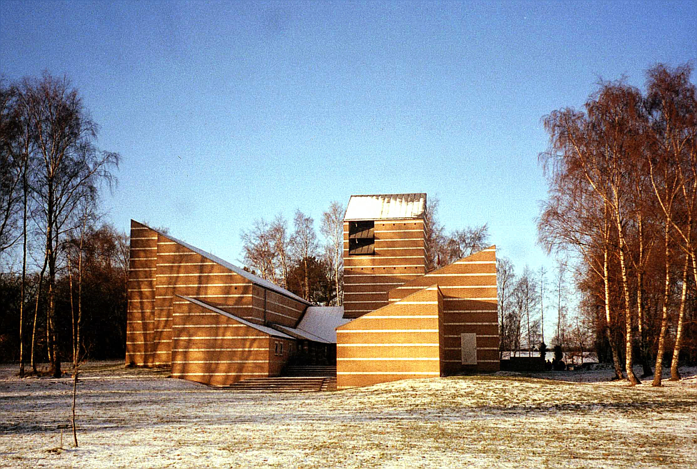 Egedal Kirke, Karlebo Sogn, Fredensborg Kommune